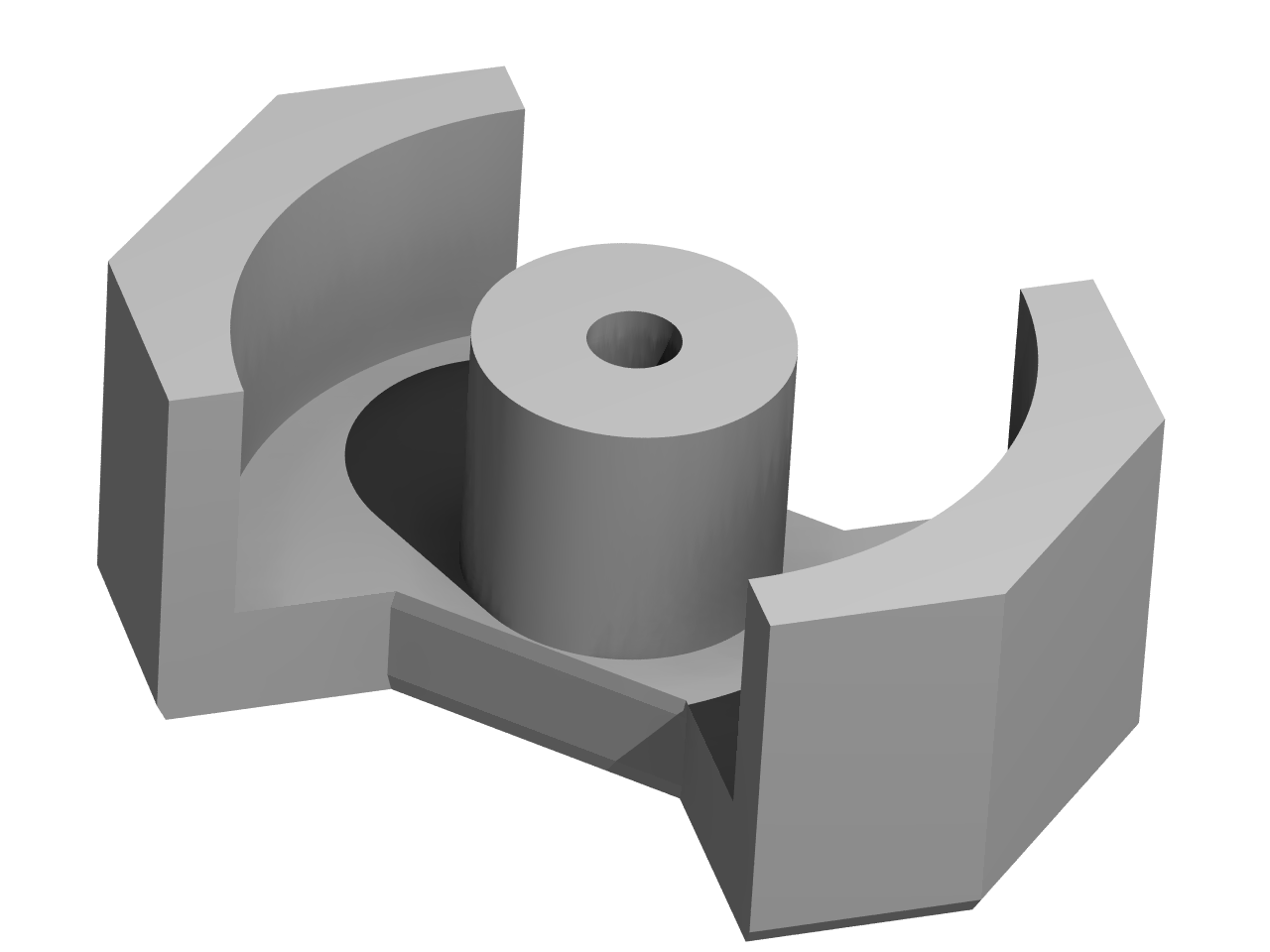 RM magnetic core